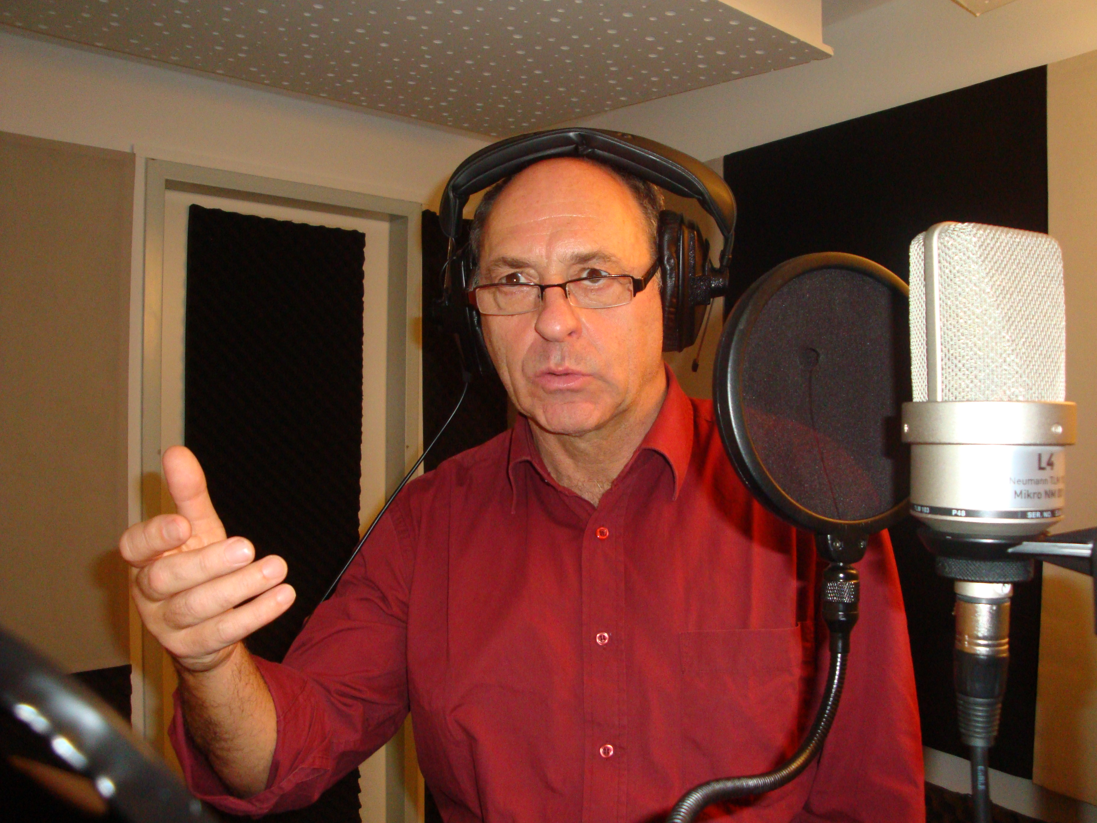 Uwe Karpa im Synchronstudio